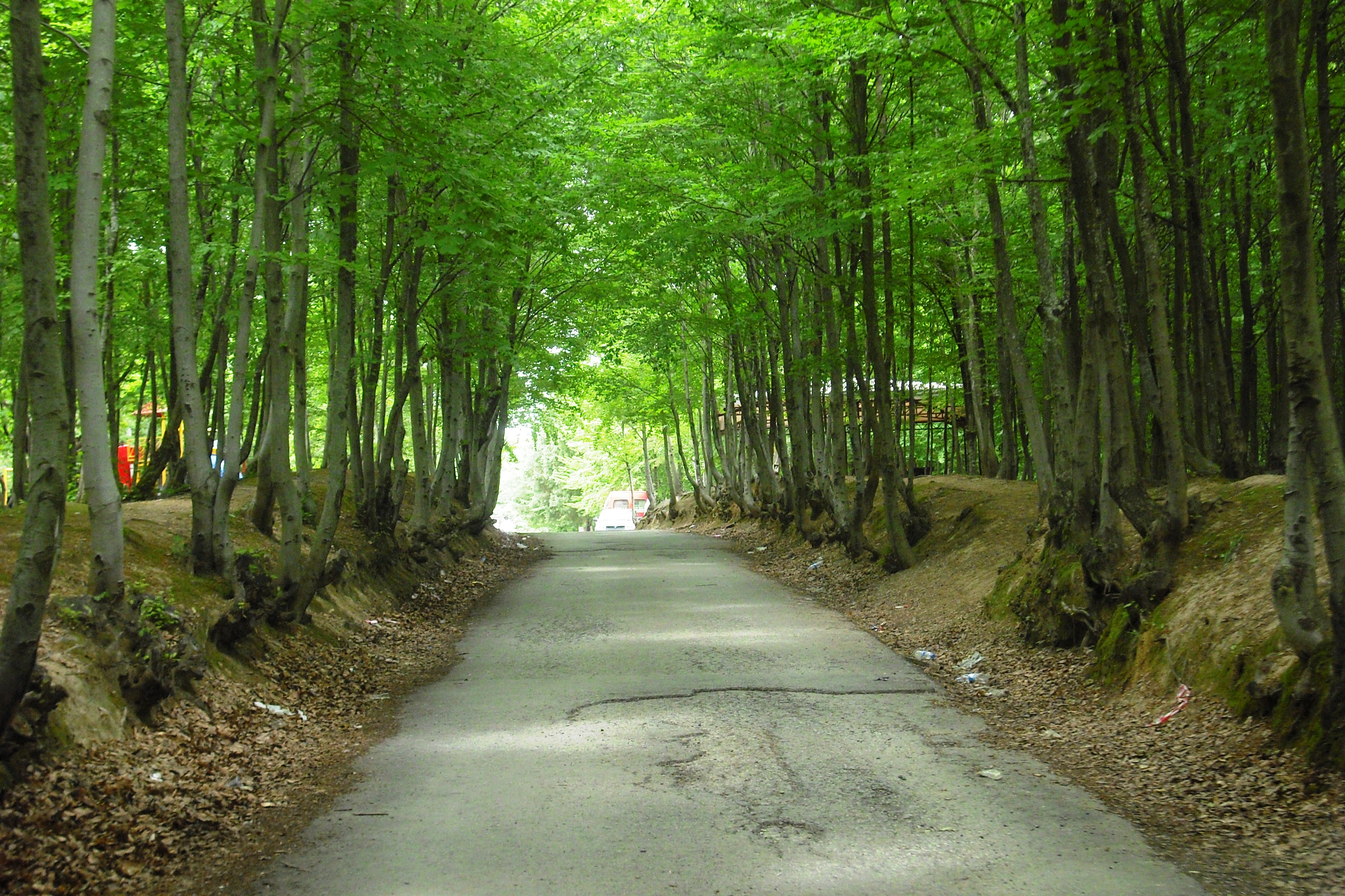 Çamdağı, Hendek Selman Dede piknik alanı